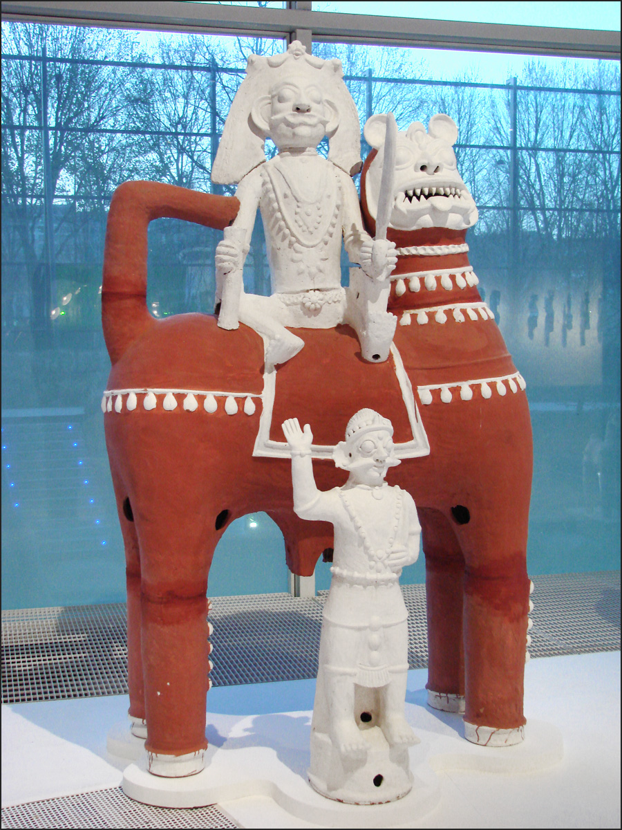 Thangayya Karuppaswami chevauchant un tigre Terre cuite, acrylique blanche 2009 figures votives en terre cuite peinte réalisées pour l'exposition Oeuvres des potiers Kusavan et Velar du Tamil Nadu Image de l'exposition "Autres Maîtres de l'Inde, créations contemporaines des Adivasi " Musée du Quai Branly Paris